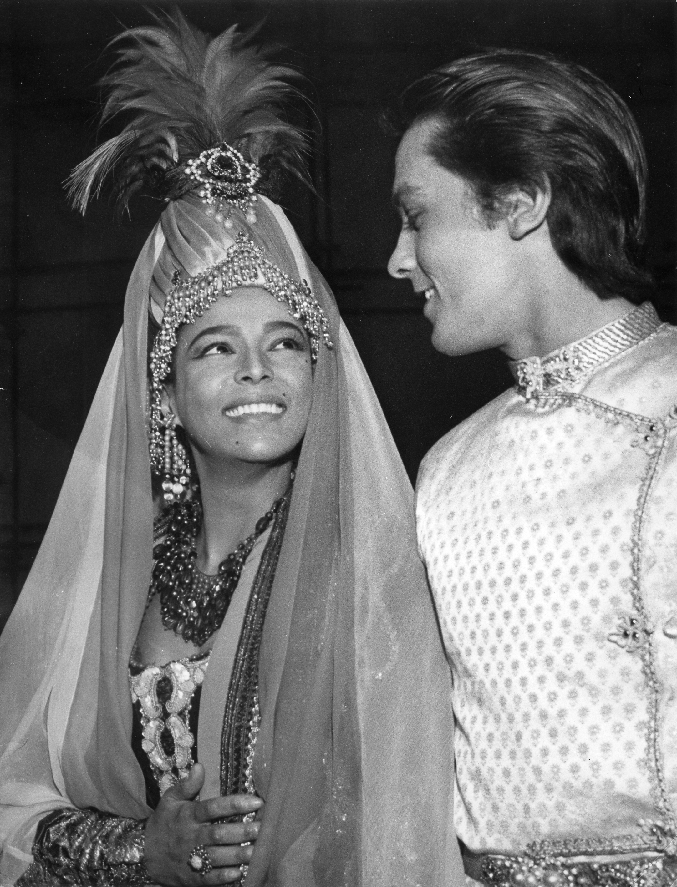 Stevan Kragujević: Snimanje filma "Čudesne pustolovine Marka Pola", u Beogradu, 1962. Alen Delon i Doroti Dendridž (po odobrenju kćerke Tanje Kragujević)